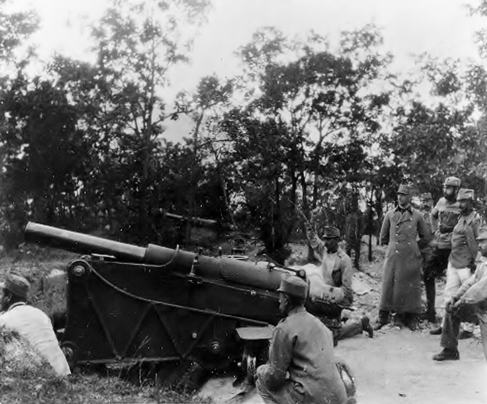 12cm-M96 MSK del Forte Mattarello